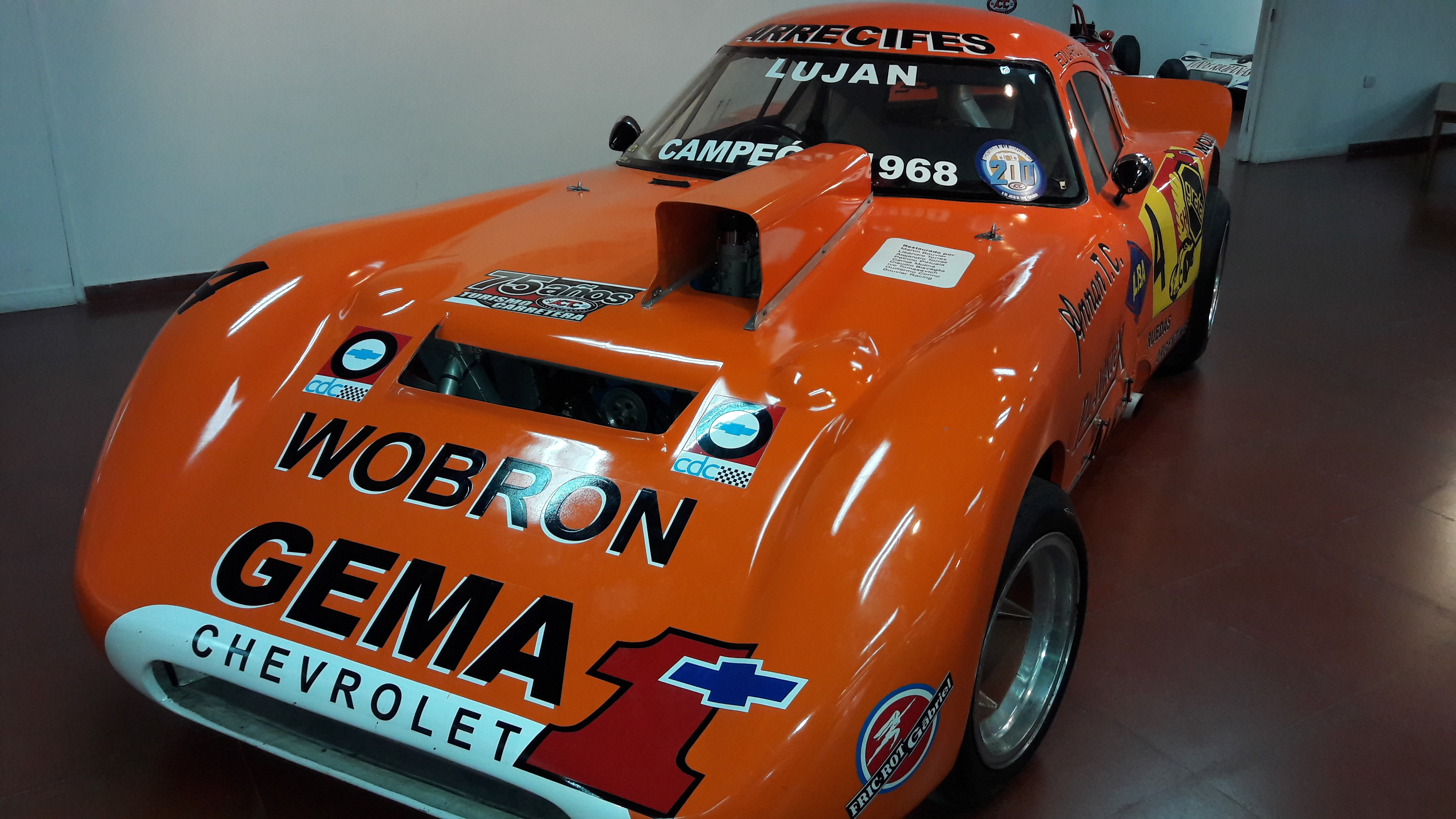 Trueno Naranja - Carlos Pairetti. Expo Autos, Museo de Bellas Artes de Luján